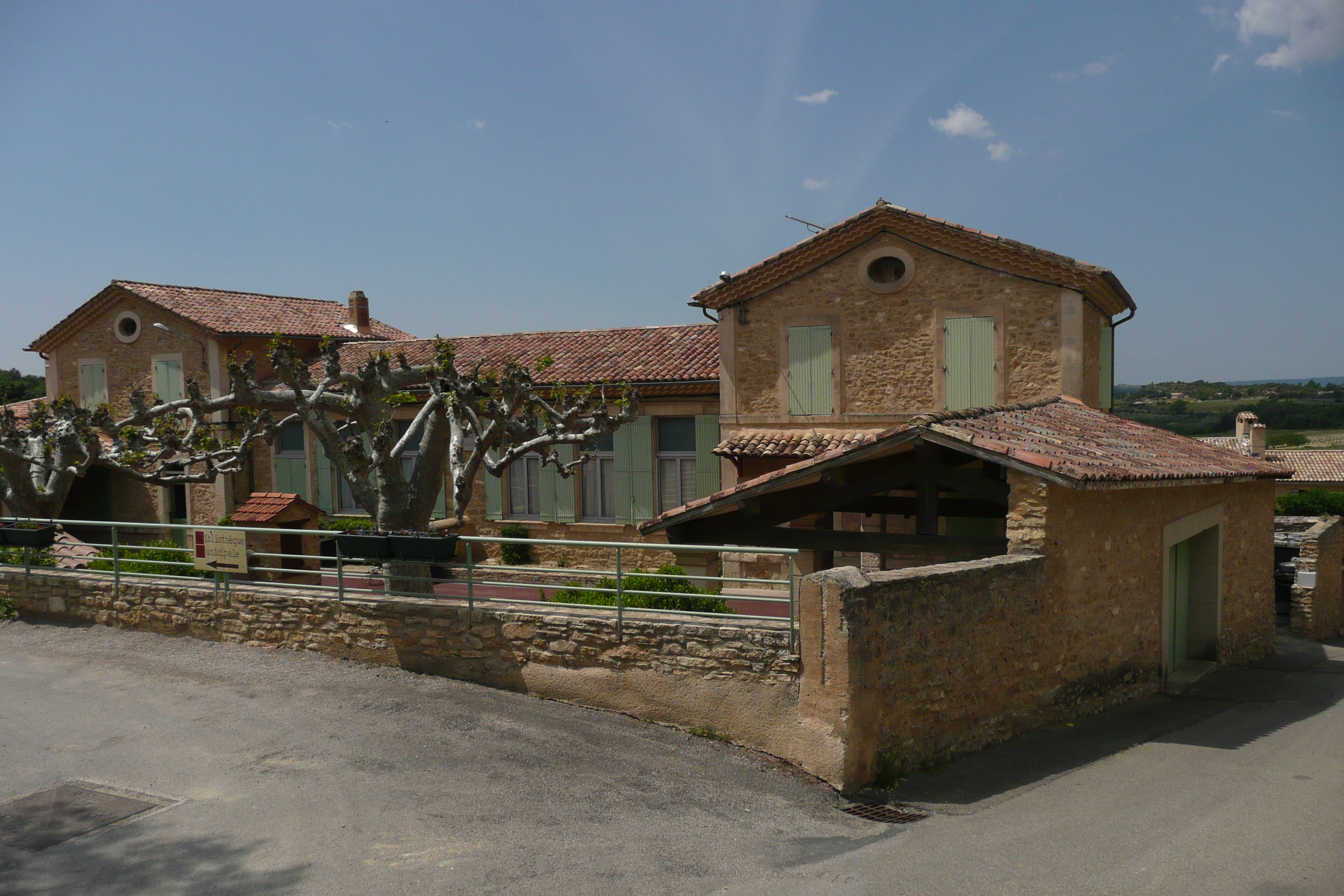 Ecole à Faucon (Vaucluse).